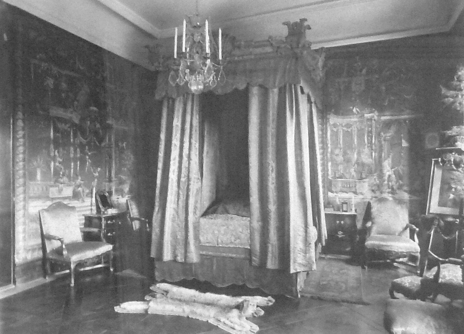 Tureholms slott gobelängrummet med textiler innan de flyttades till Stockholms stadshus "Ovalen"